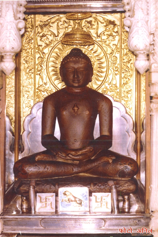 Sh. Mahawer ji